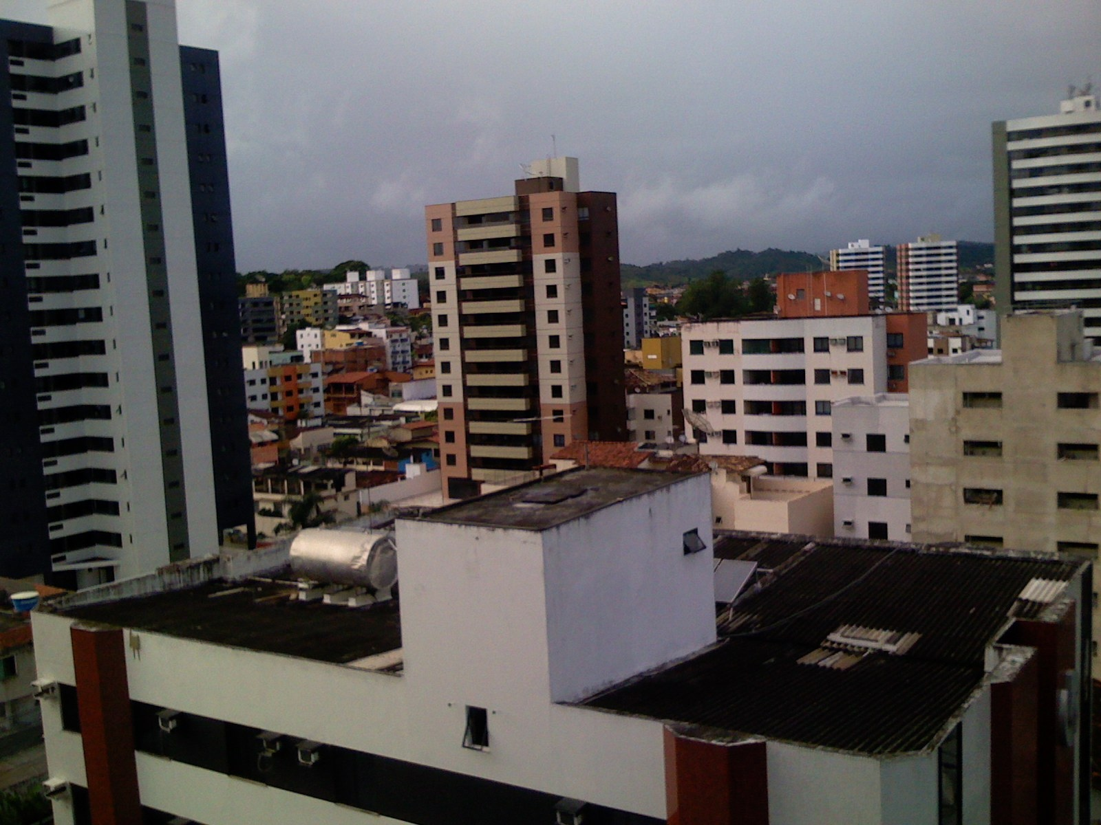 Vista da Cidade de Itabuna, Bahia.